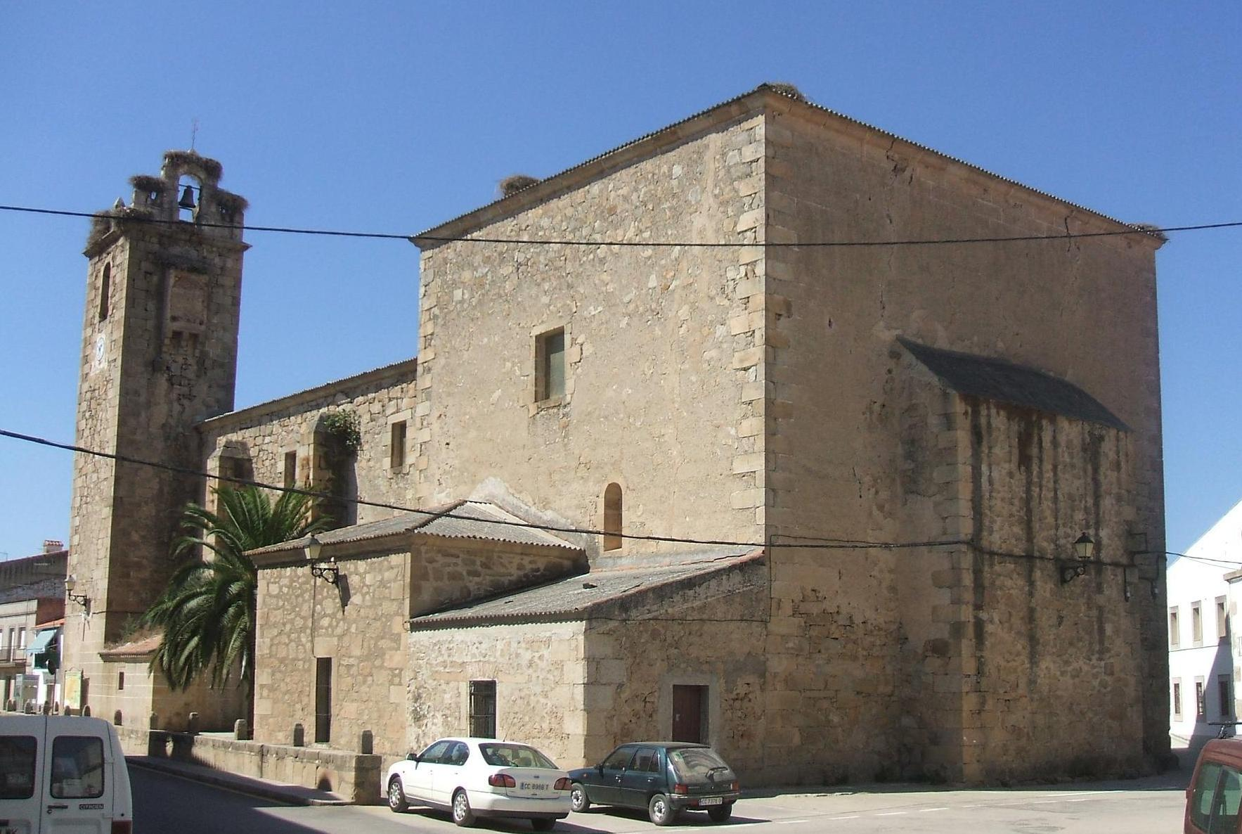 En Navas del Madroño la iglesia parroquial presenta una fábrica imponente, construída en estilo tardorrenacentista según planos de un arquitecto discípulo de Juan de Herrera.